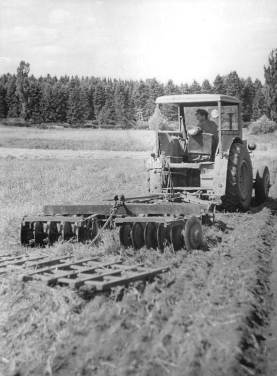 Fritscheshof, Traktorist beim Eggen Zentralbild Koziel Weiß-Noa 12.8.1957 Erste Ernte der LPG " Wismut " Die LPG " Wismut ", Fritscheshof bei Neubrandenburg, die im März 1957 von ehemaligen Kumpeln aus Johanngeorgenstadt gegründet wurde, bringt jetzt ihre erste Getreideernte ein. UBz: Traktorist Holtmann von der MTS Chemnitz, Bez. Neubrandenburg, beim Schälen der abgeernteten Getreidefläche mit der Scheibenegge.